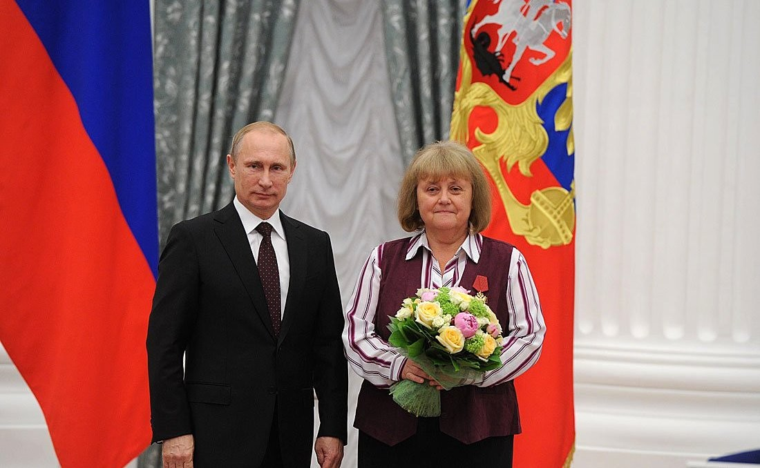 Орденом «За заслуги перед Отечеством» IV степени награждена Светлана Савицкая